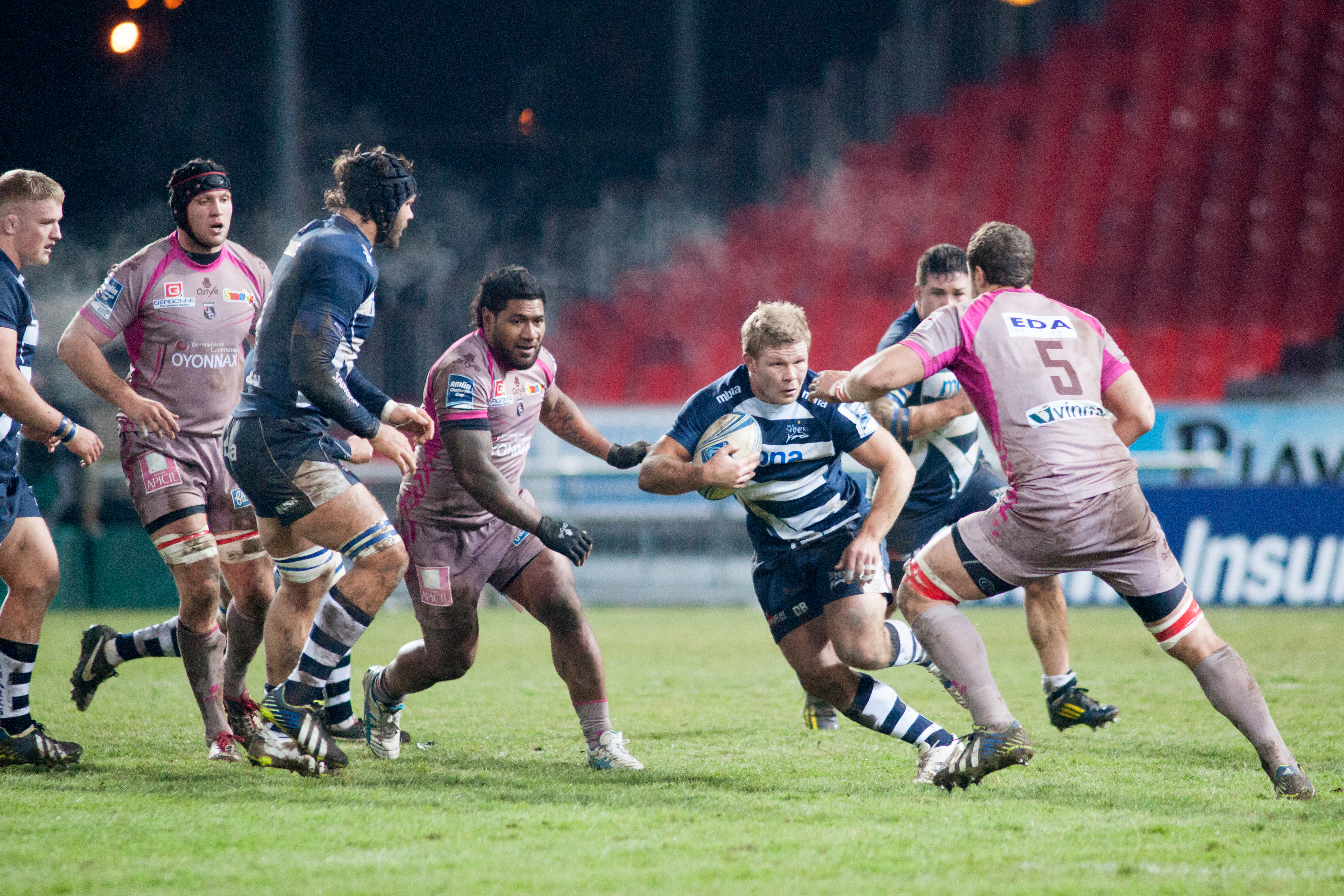 US Oyonnax c. Sale Sharks, 5 décembre 2013.